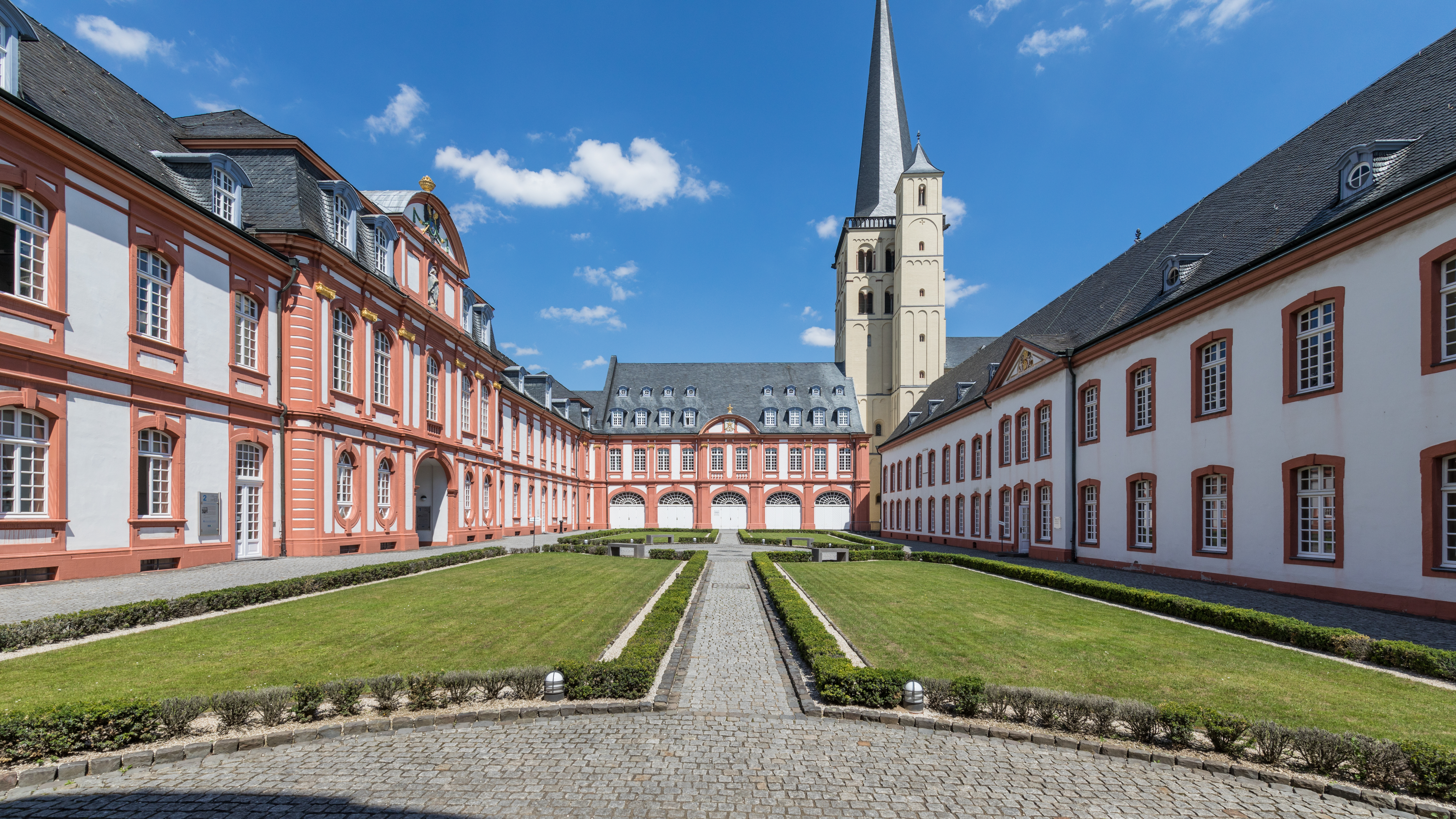 Abtei Brauweiler, Prälaturhof. Rechts im Hintergrund die Abteikirche St. Nikolaus